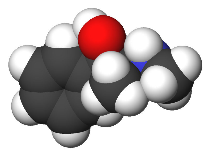 Ephedra